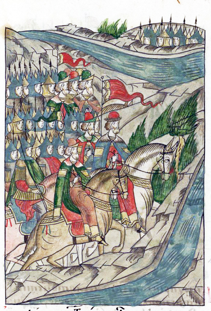 И в 6889 году, в месяце сентябре, пришел великий князь Дмитрий Иванович на место, называемое Березуй, за двадцать три поприща до Дона.